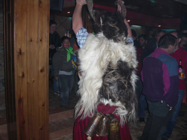 Trangas Bielsa